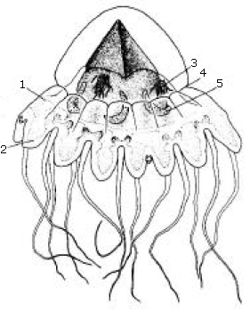 Coronatae-scheme.png: Схема coronatae